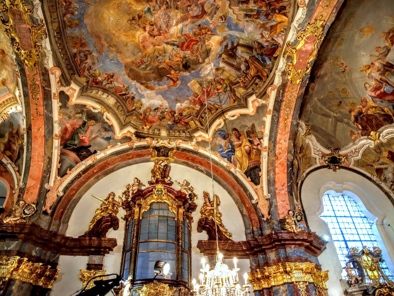 Pražská Loreta